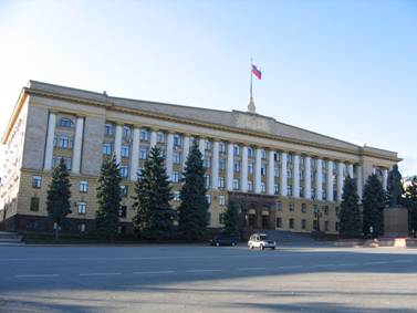 Дом Советов, Липецк, Соборная площадь, площадь Ленина